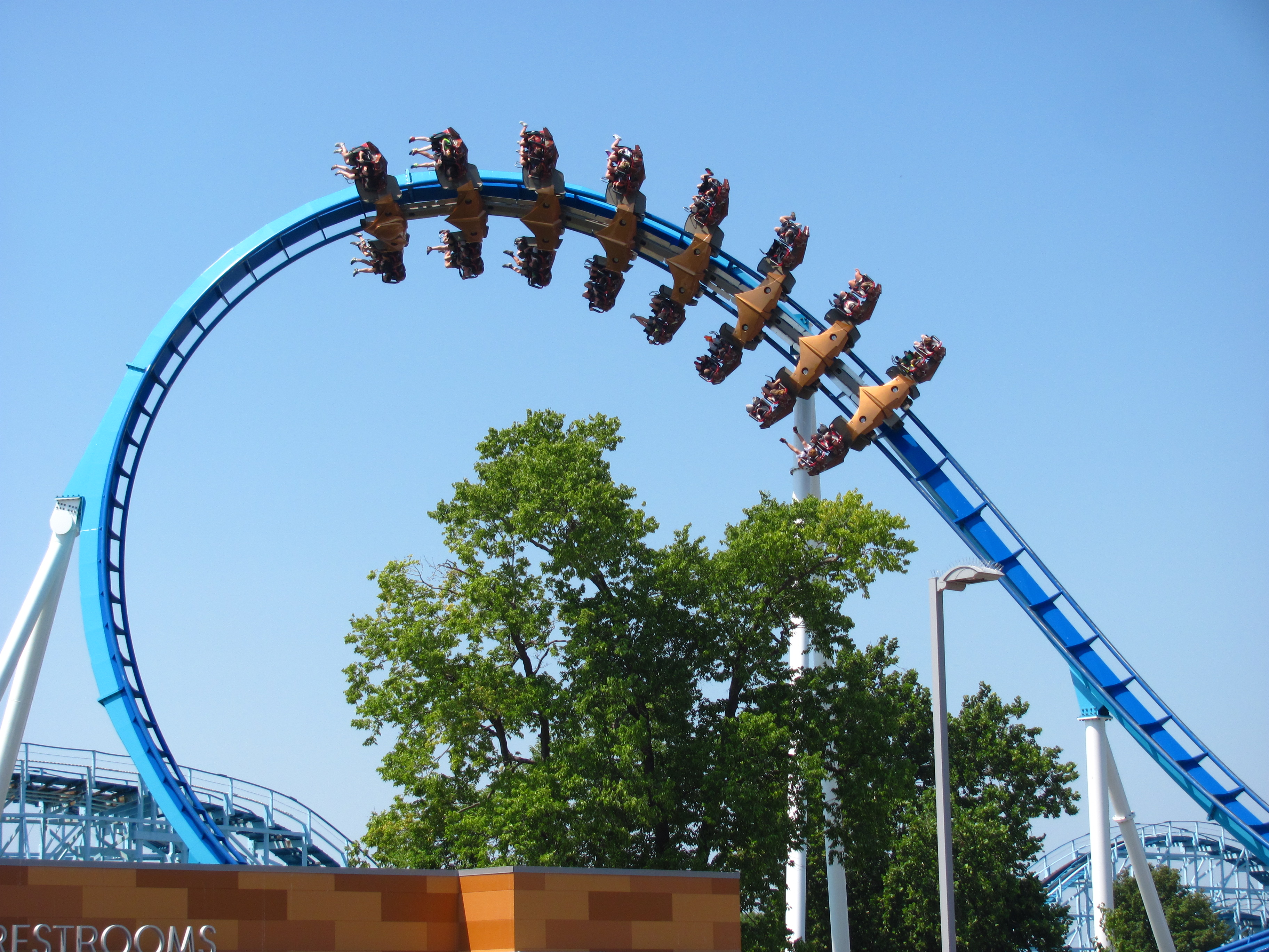 Cedar Point 006